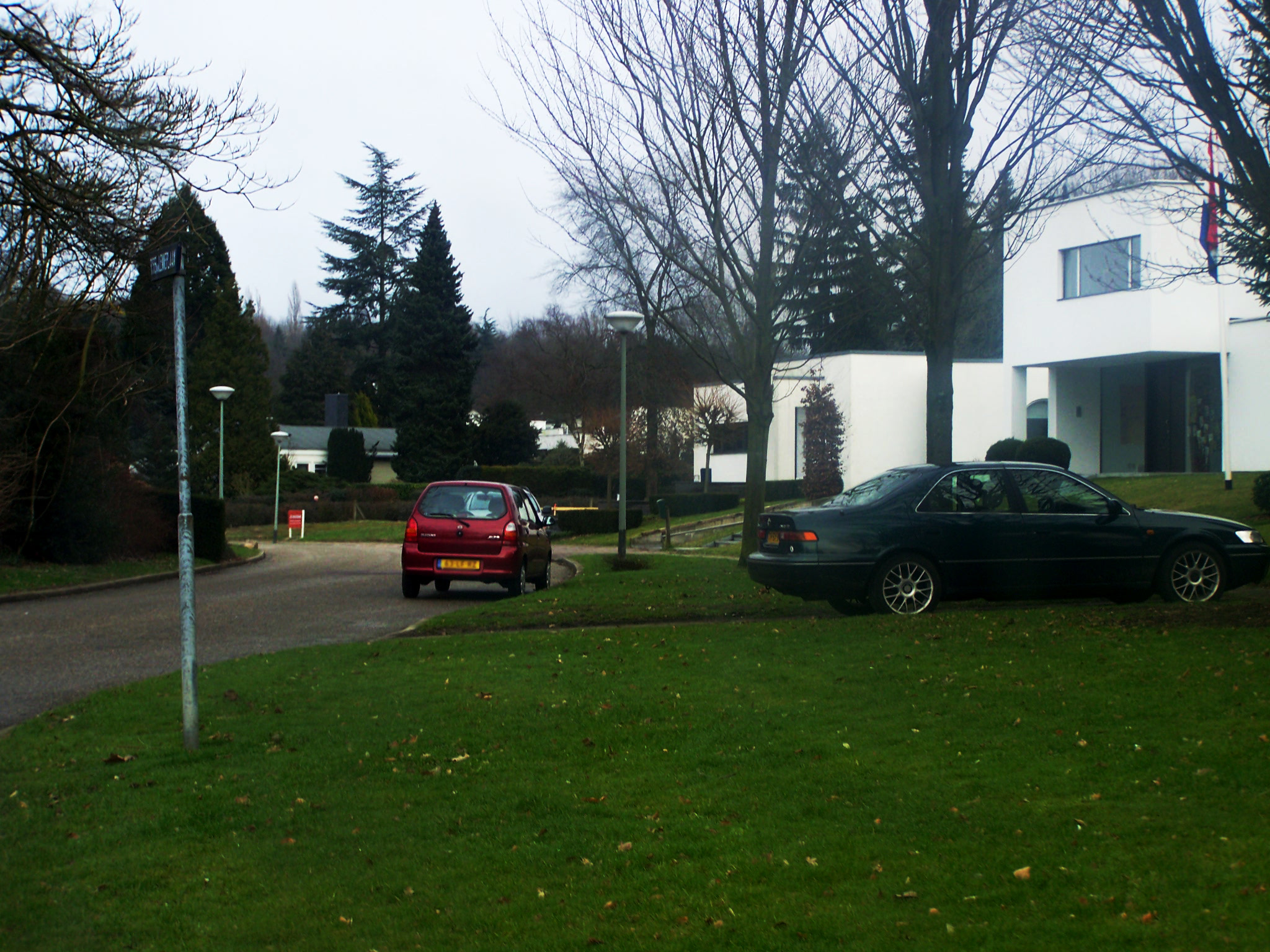 Drehort Flodders: Wo das das Schild „Zonnedael“ stand.